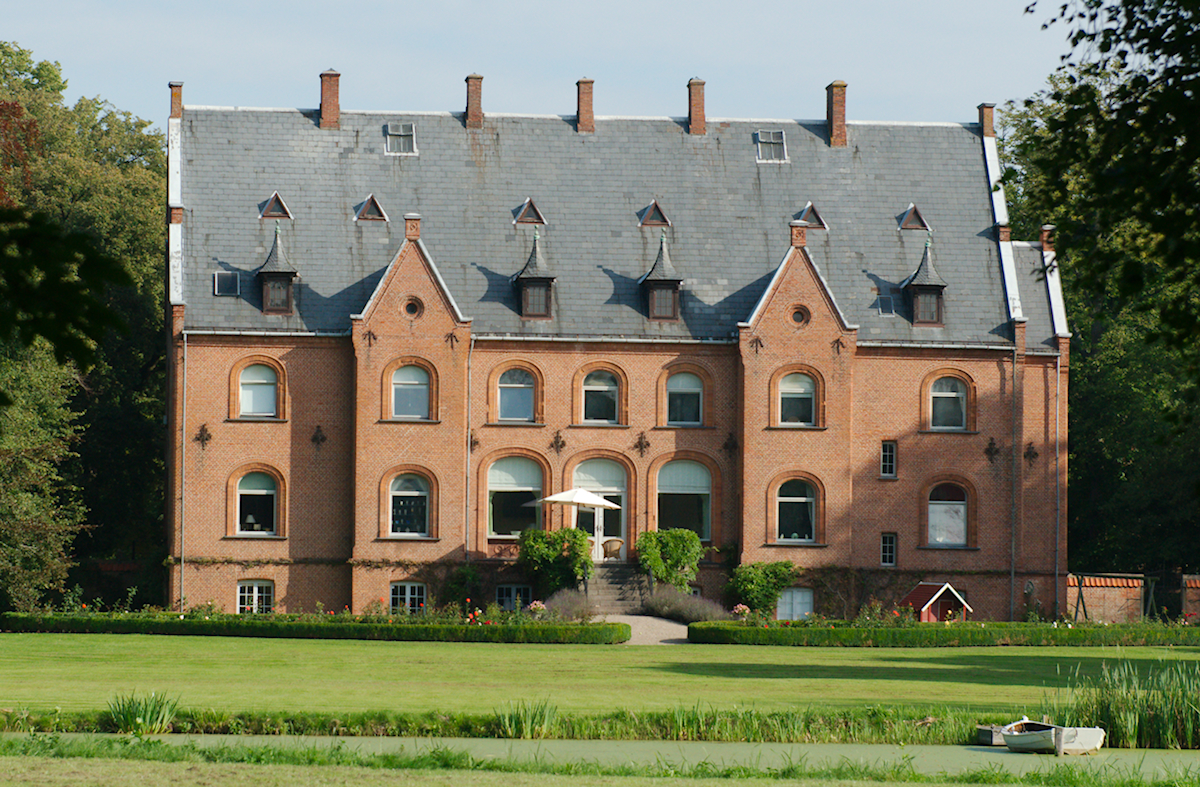 Sanderumgaard 2012 (bagside)